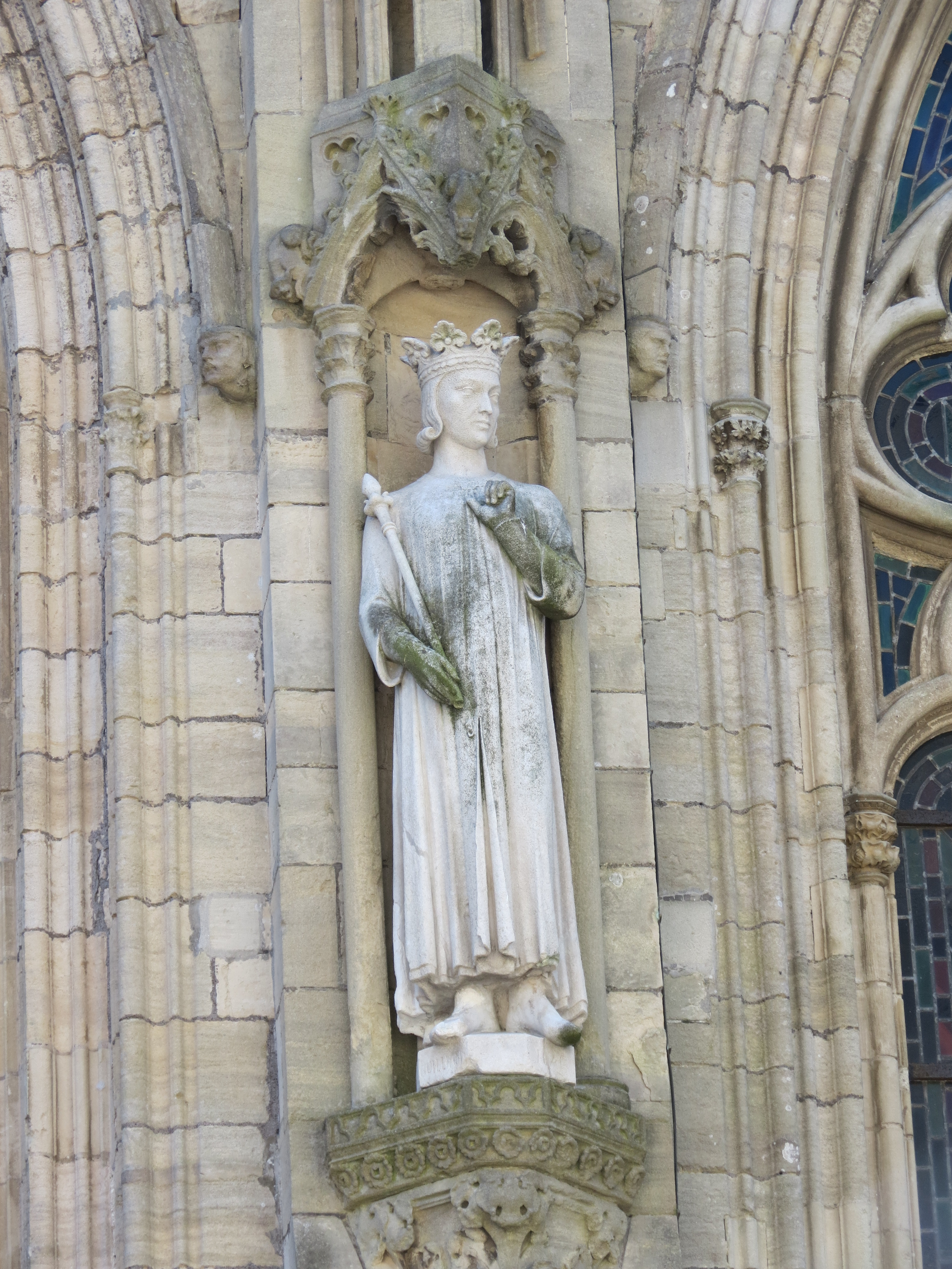 Statue de Guillaume Bras-de-Fer datant de 1875, remplaçant celle abîmée à la Révolution.